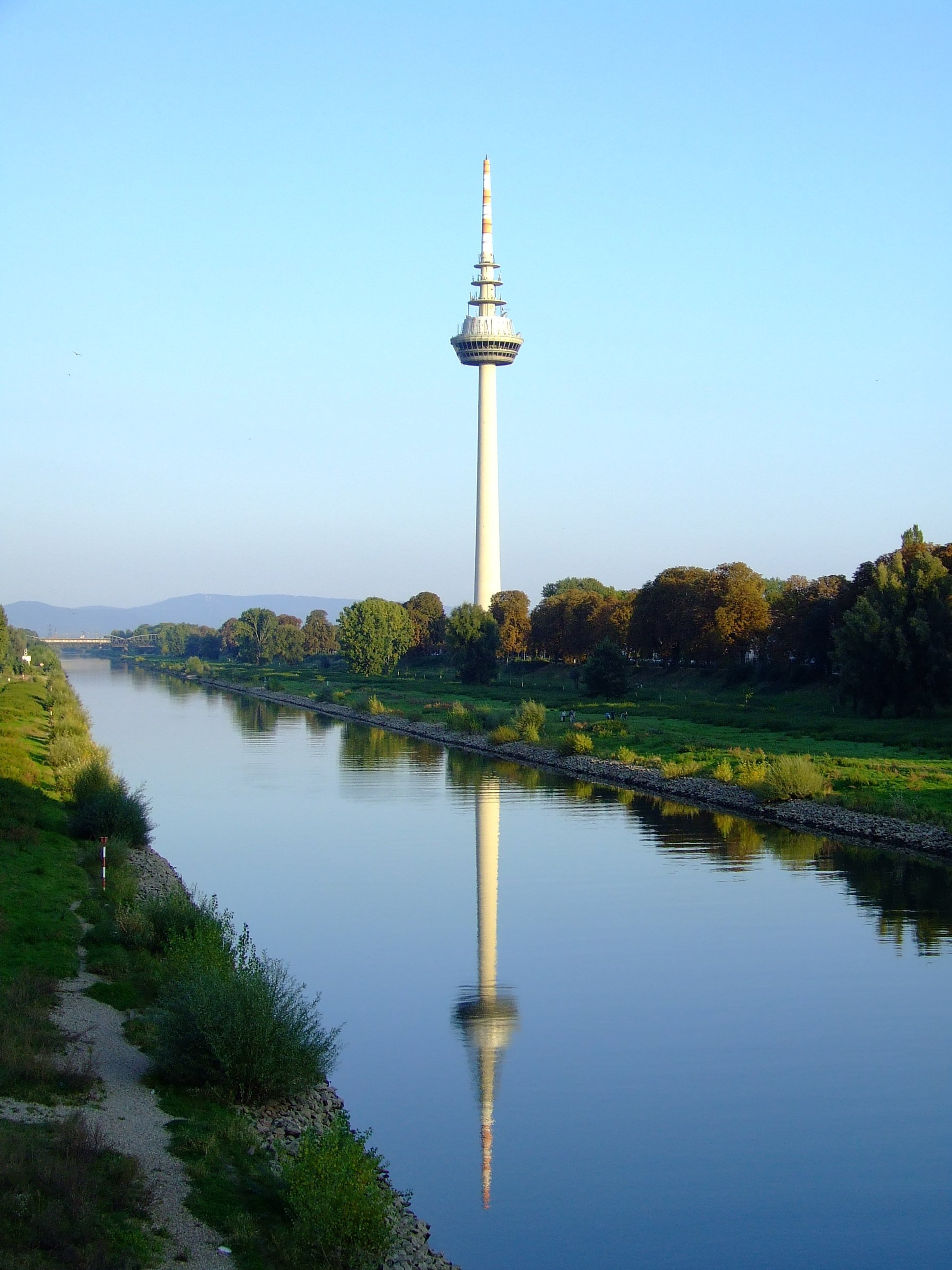 Fernmeldeturm Mannheim.